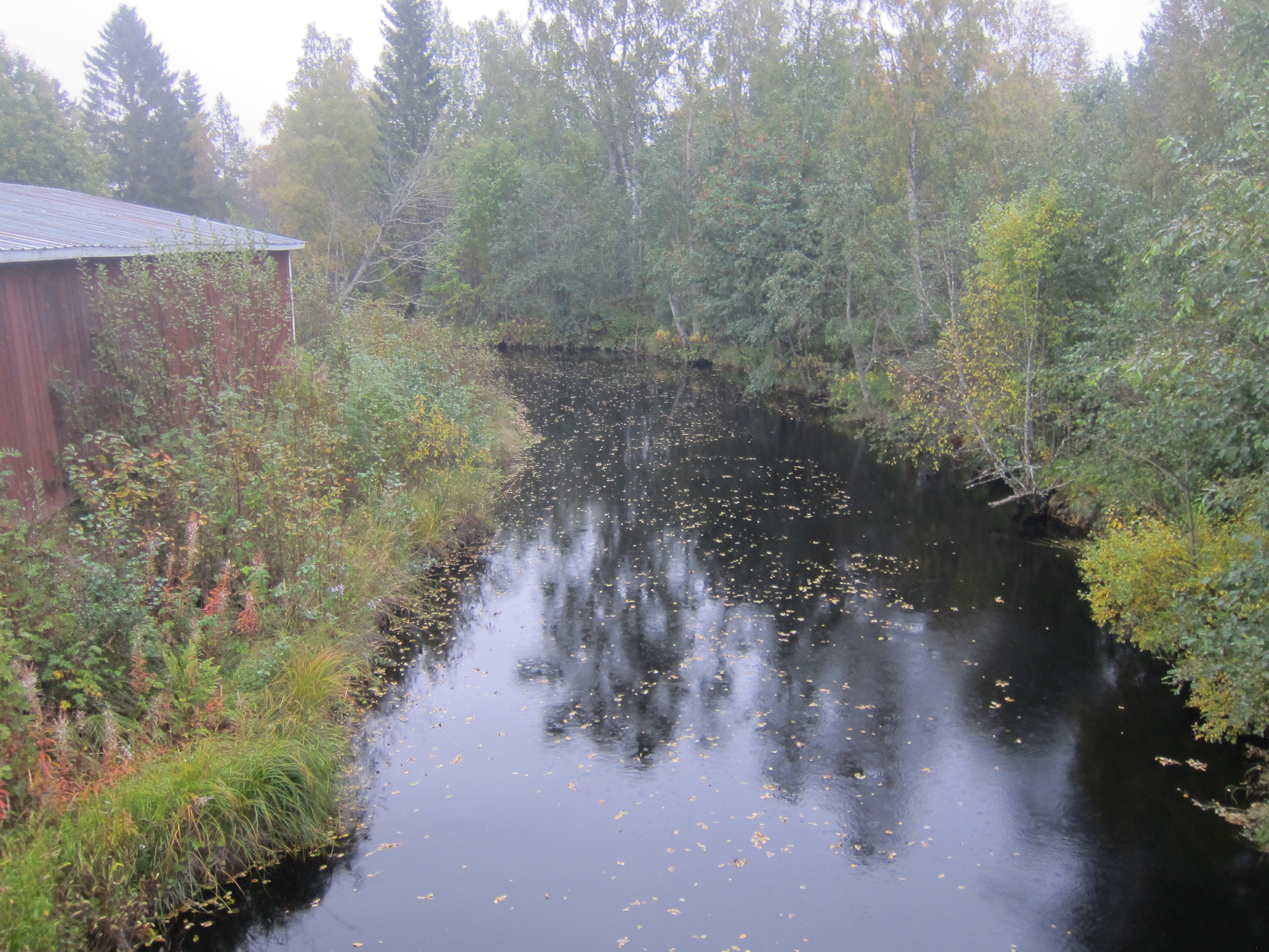 Sörmjöleån.